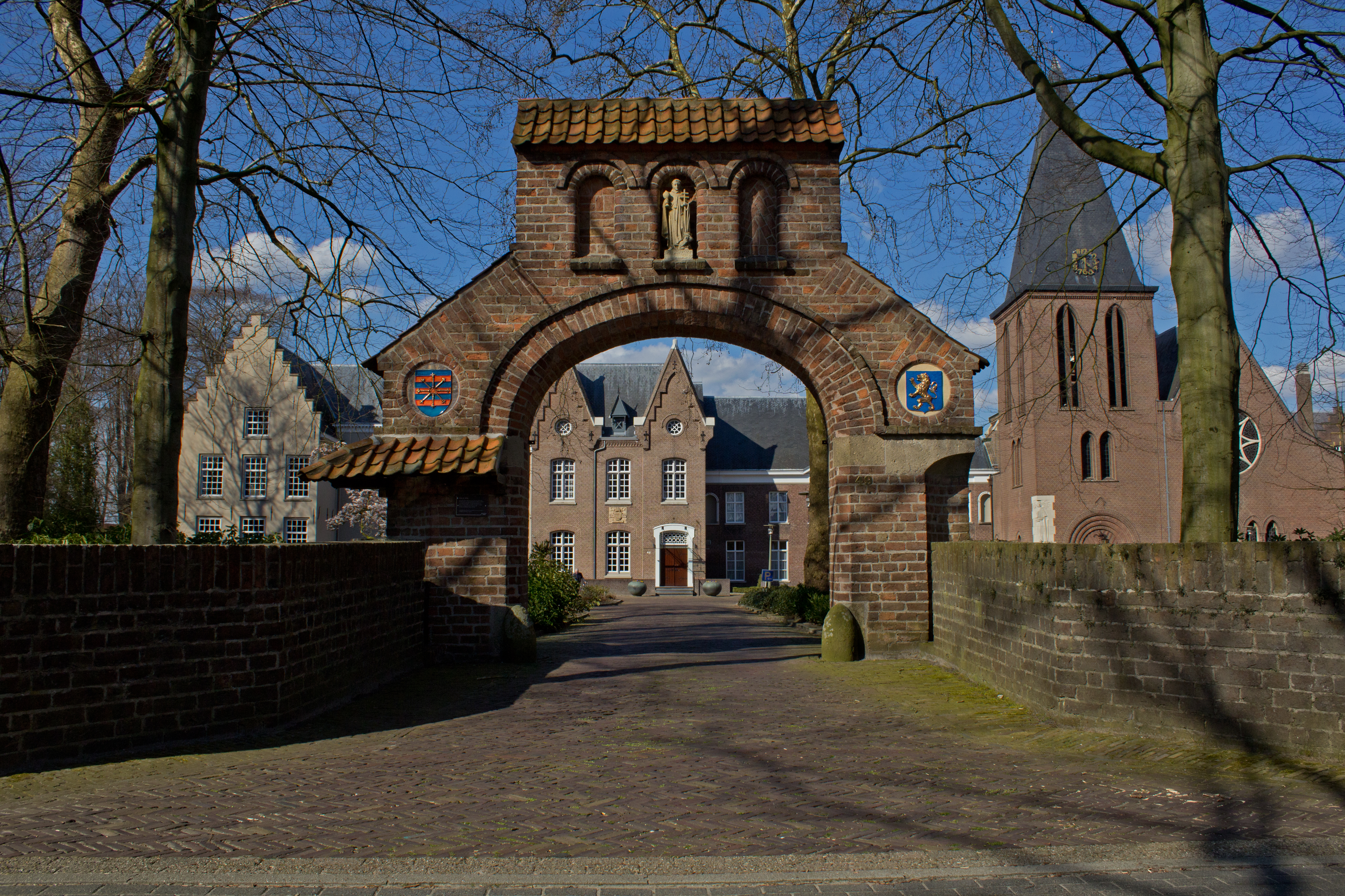 Abdij van Berne - Abdijpoort